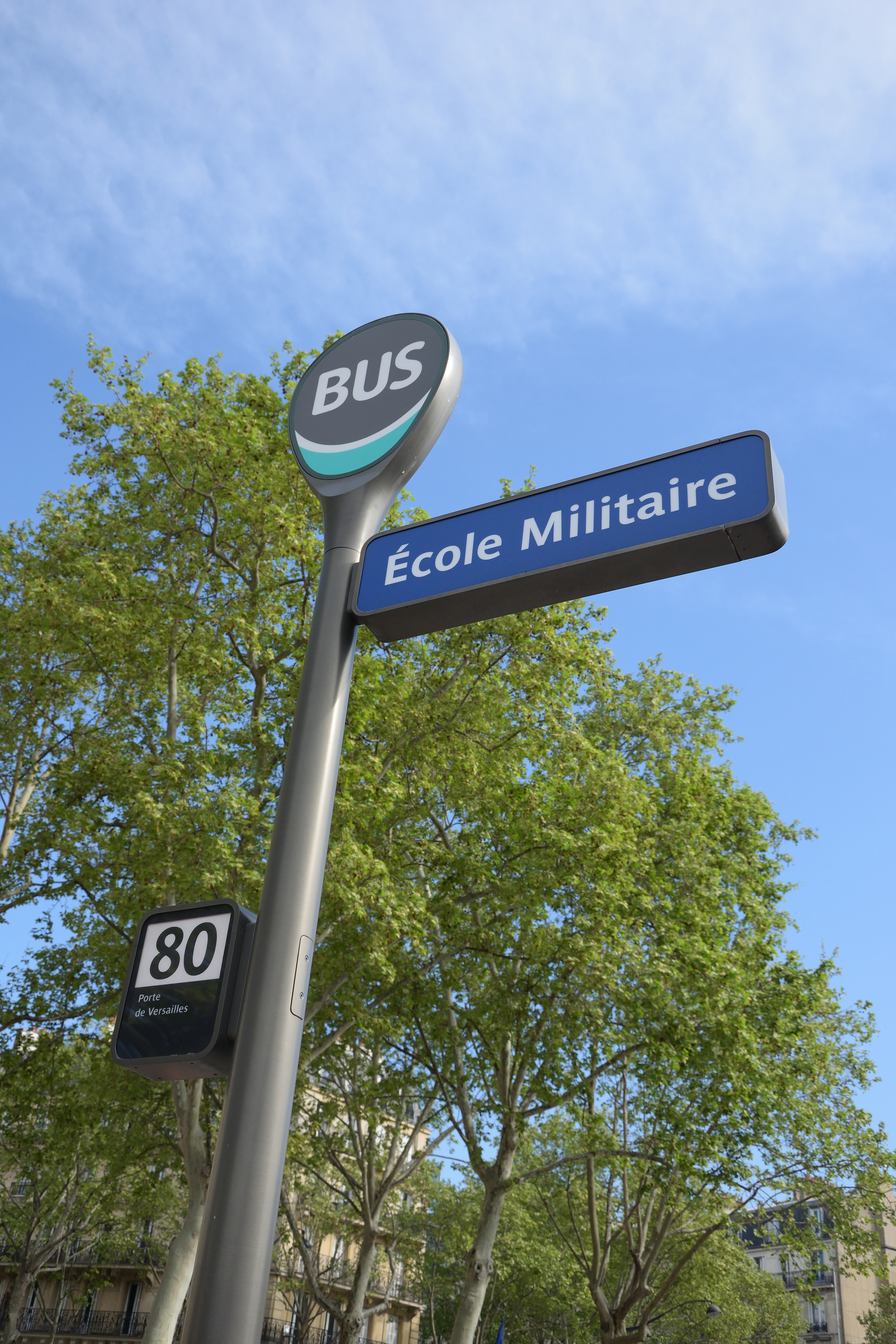 Arrêt de bus RATP « École Militaire » de la ligne 80, à Paris.